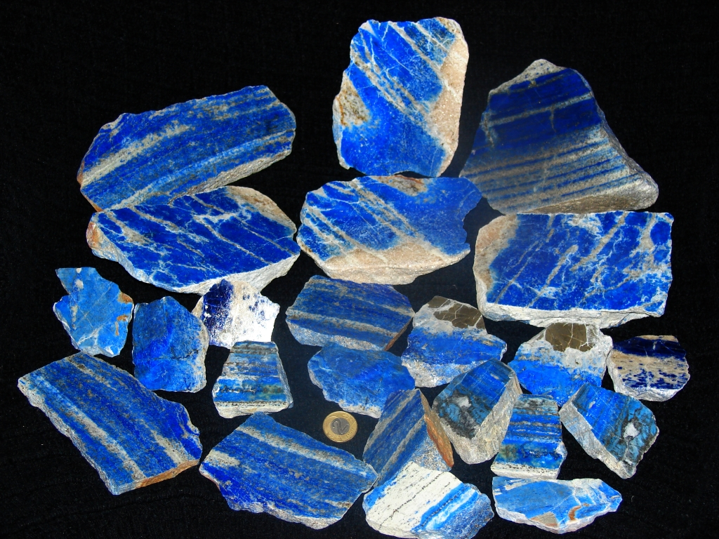 Lapis lazuli, polerowane bryłki